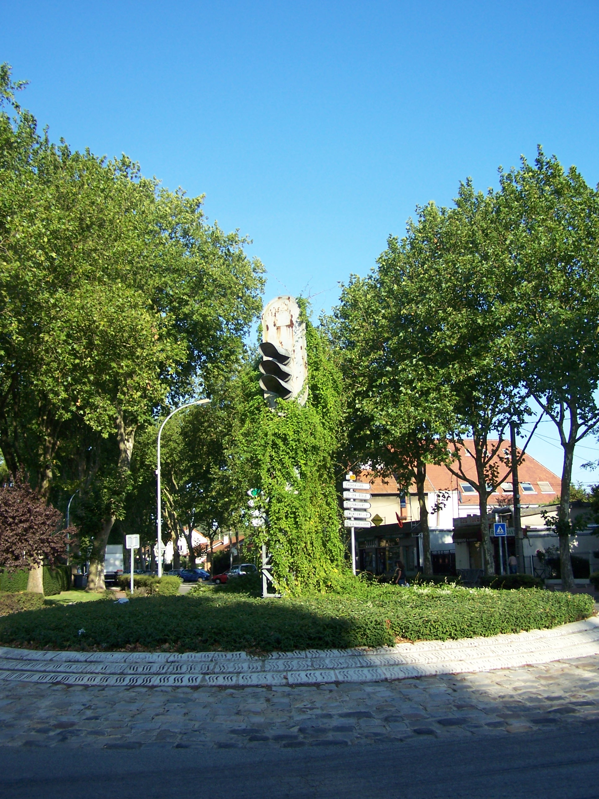 Sémaphore à Trappes (Yvelines, France)